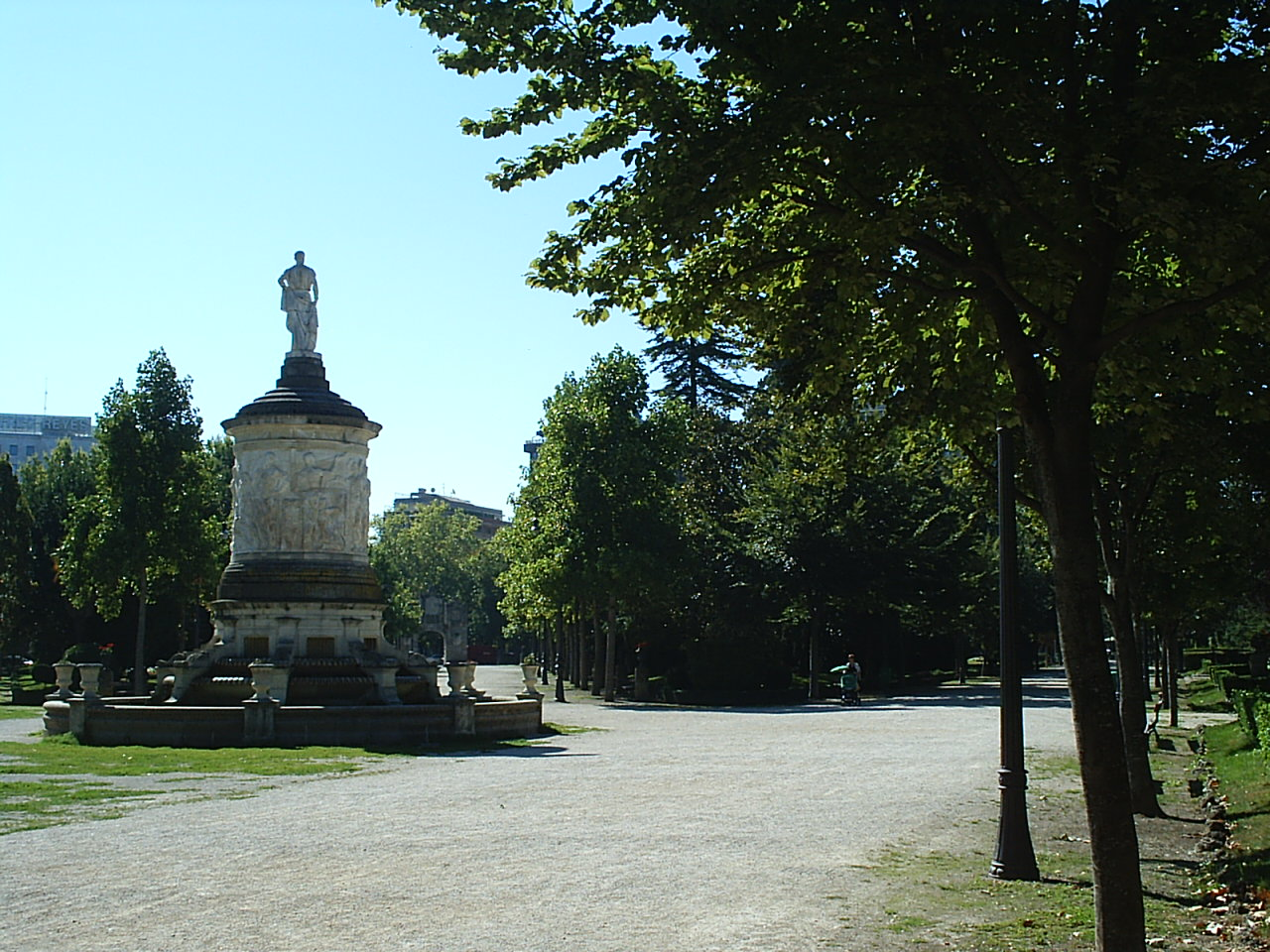 Jardines de La Taconera.